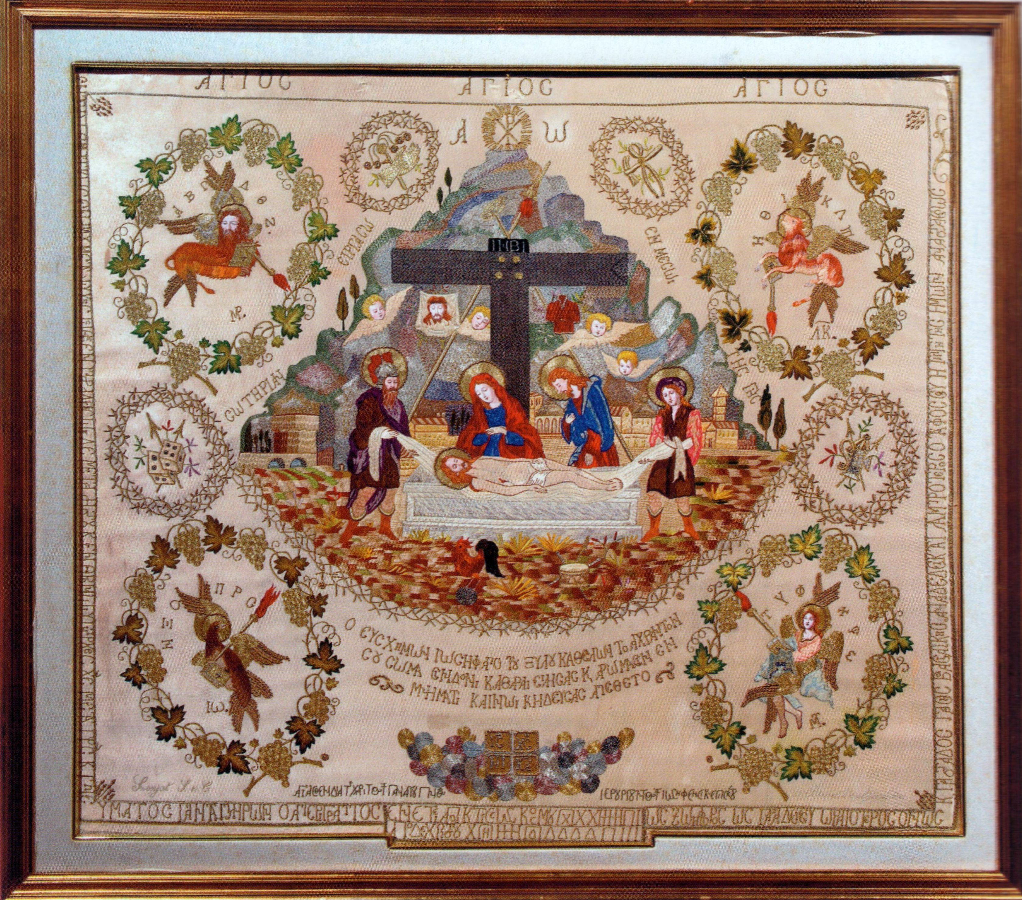 Epitàfios. Raso ricamato in oro e argento filato, XIX secolo, Piana degli Albanesi, Cattedrale di San Demetrio Megalomartire.